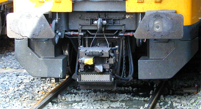 BSI-koppeling op 14 juni 2001 toegepast bij NS mDDM